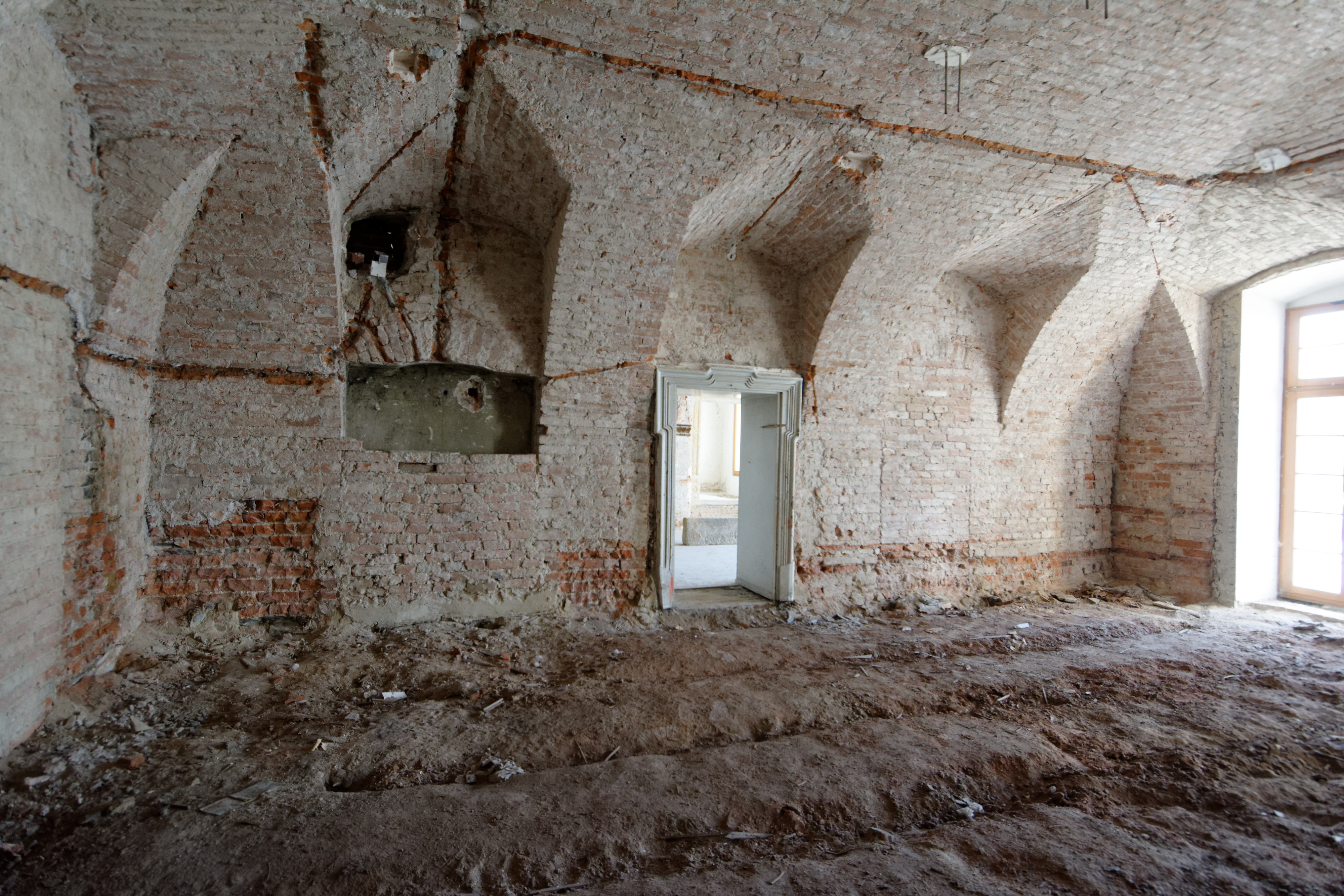 Langův dům - interiér, Litovel, Masarykova č.p. 769/2.